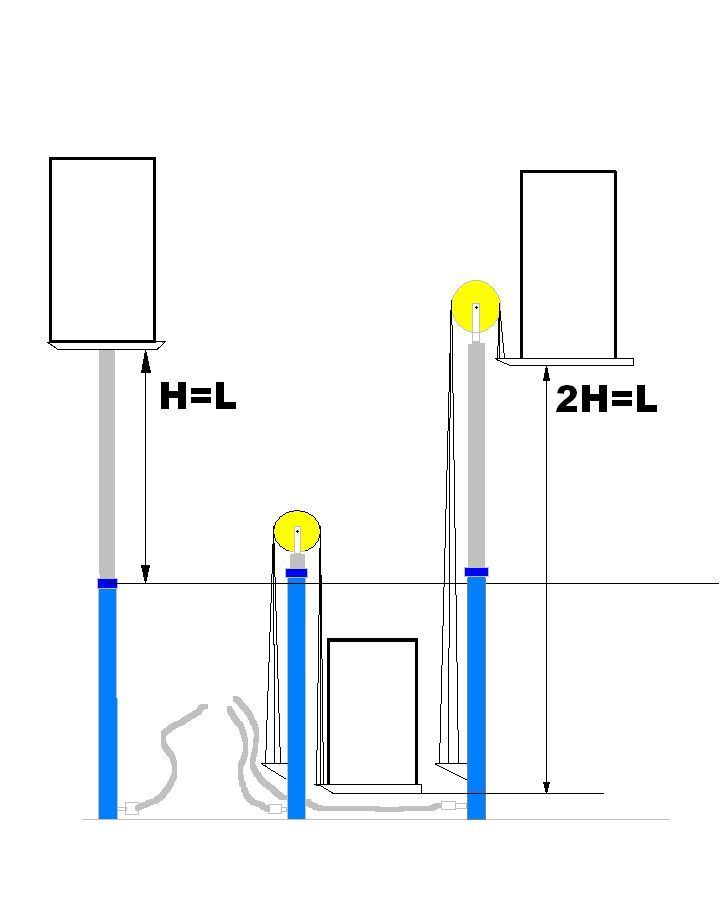 Prinzip von direkt/indirekt angetriebenen Hydraulikaufzügen